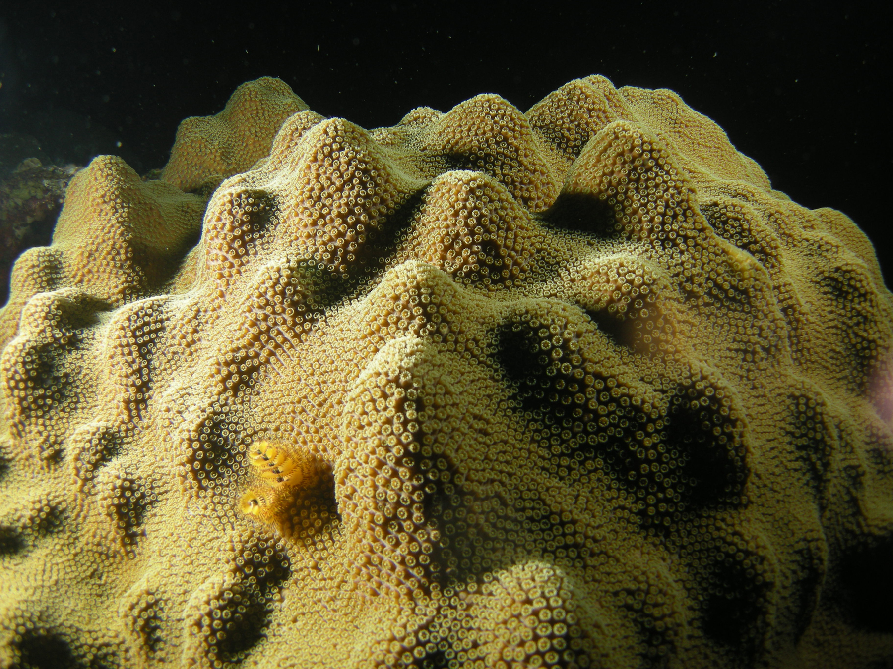 Orbicella faveolata (Montastraea faveolata), con pólipos abiertos